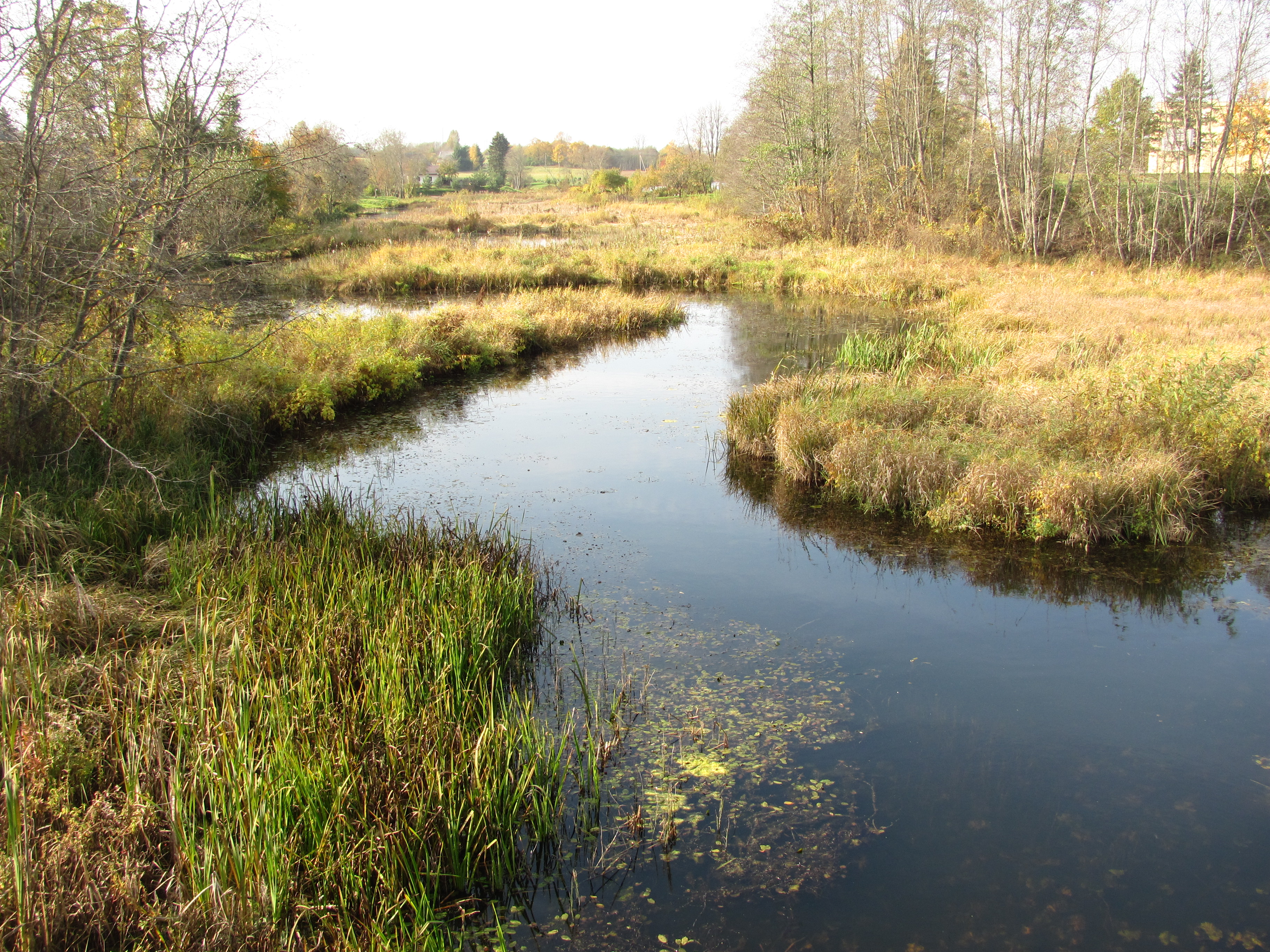 Vyžuona na jižním okraji městysu Juodupė. Pohled k západu, po proudu.